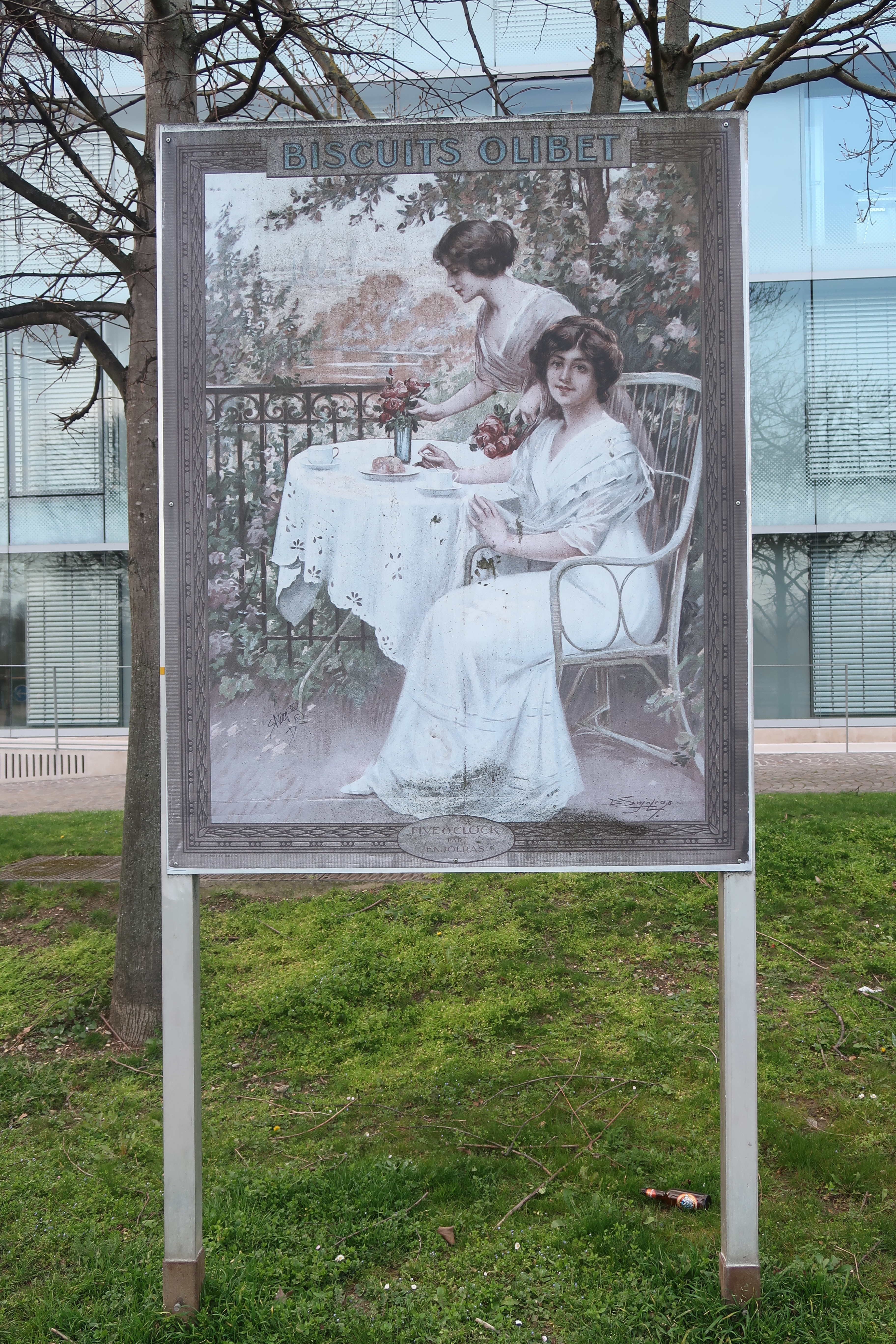 Panneau (21 quai Gallieni) avec une ancienne publicité de la marque de biscuits Olibet, rappelant l'usine qui se trouvait autrefois à Suresnes (Hauts-de-Seine).